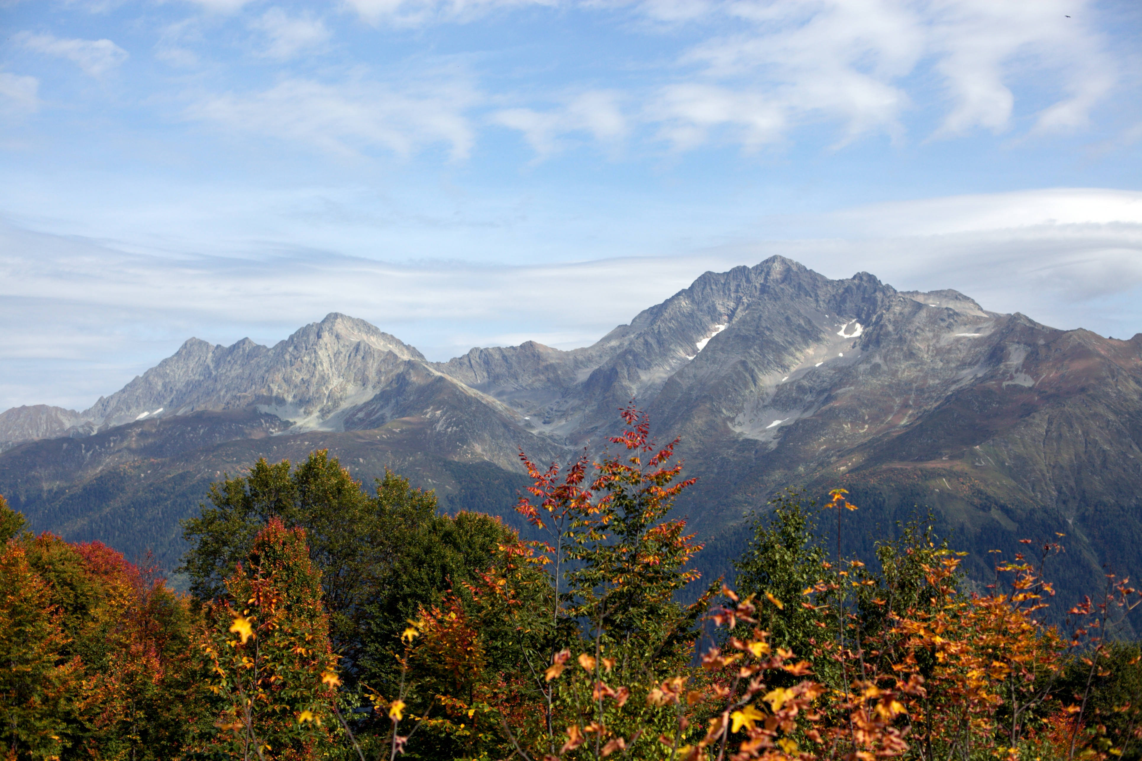 Гора Чугуш